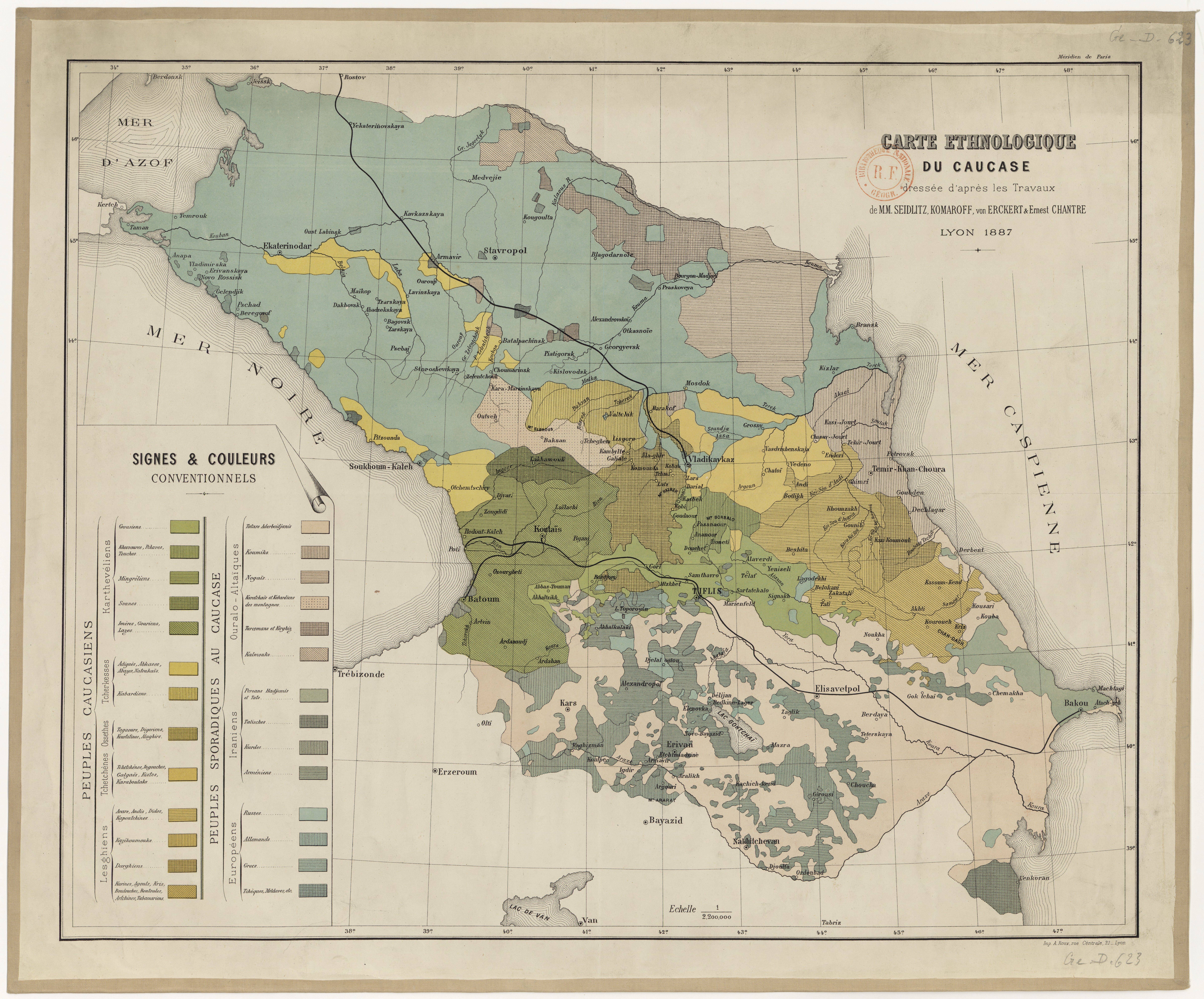 Carte ethnologique du Caucase, dressée / d'après les travaux de MM Seidlitz ; Komaroff ; von Erckert Chantre ; et Ernest Chantre